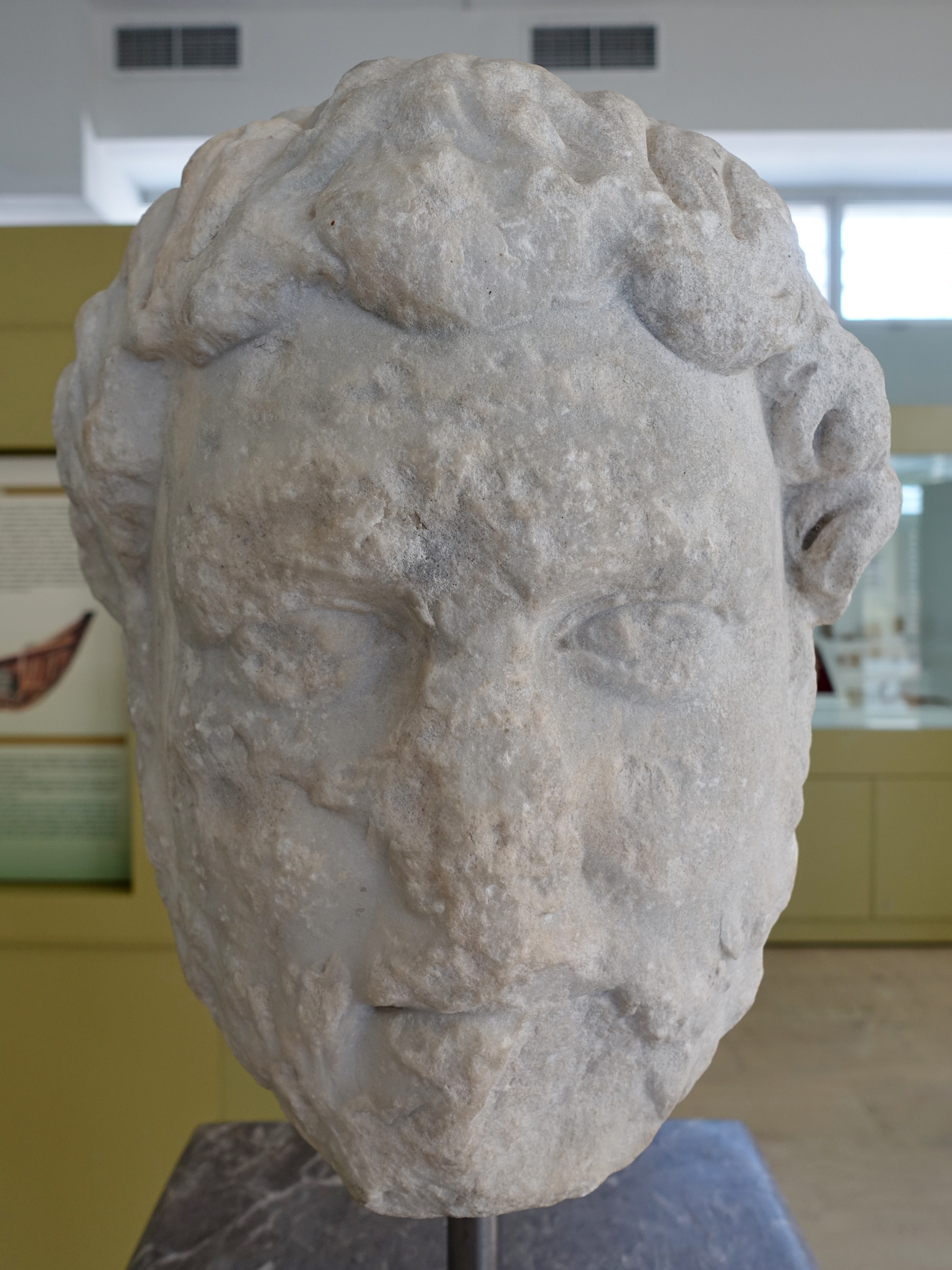 Kolossalkopf des Kaisers Hadrian, gefunden in Makrygialos, Archäologisches Museum von Sitia, Kreta, Griechenland